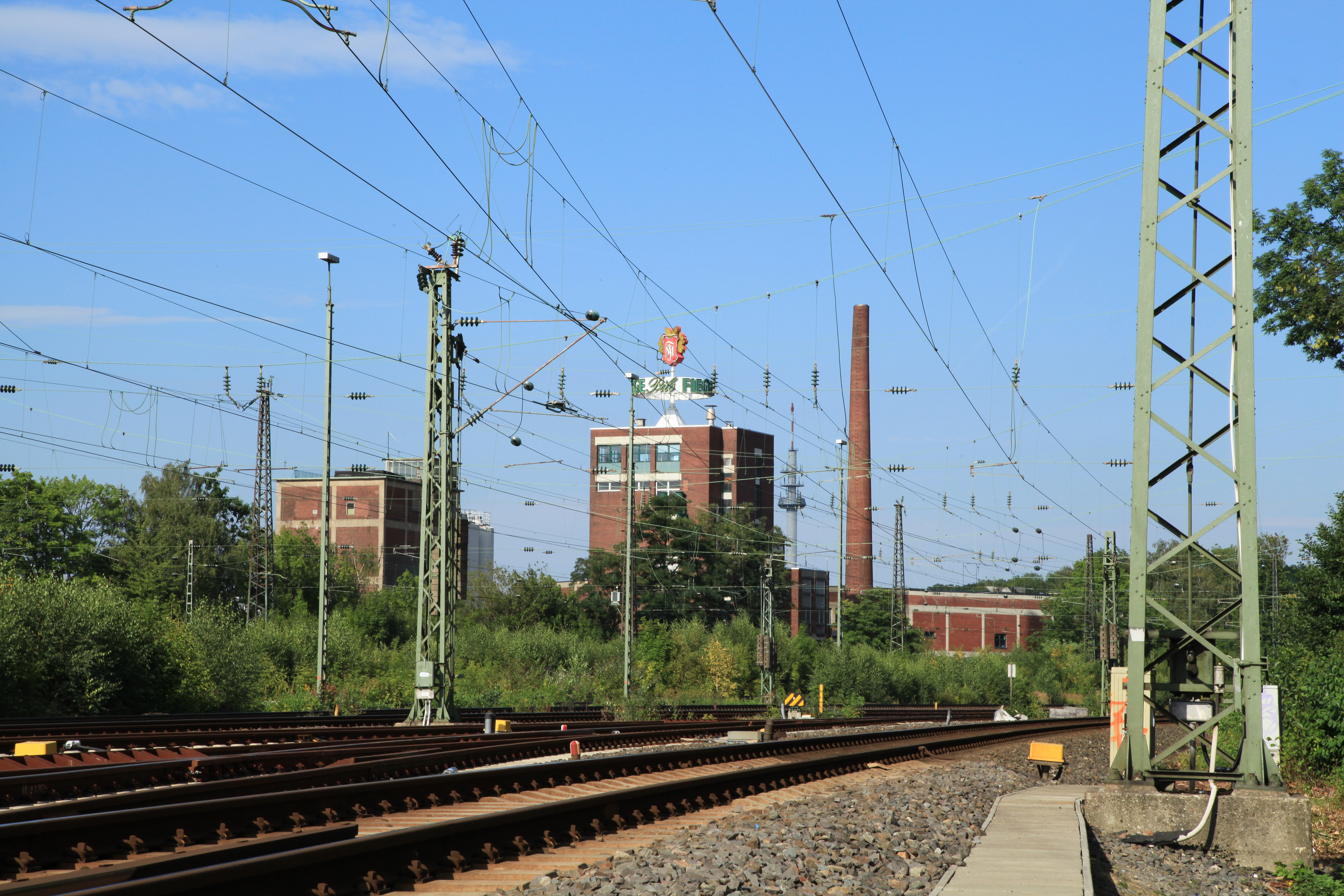 Blick von der Wittener Straße auf die Privatbrauerei Moritz Fiege, Scharnhorststraße 21-25 in Bochum